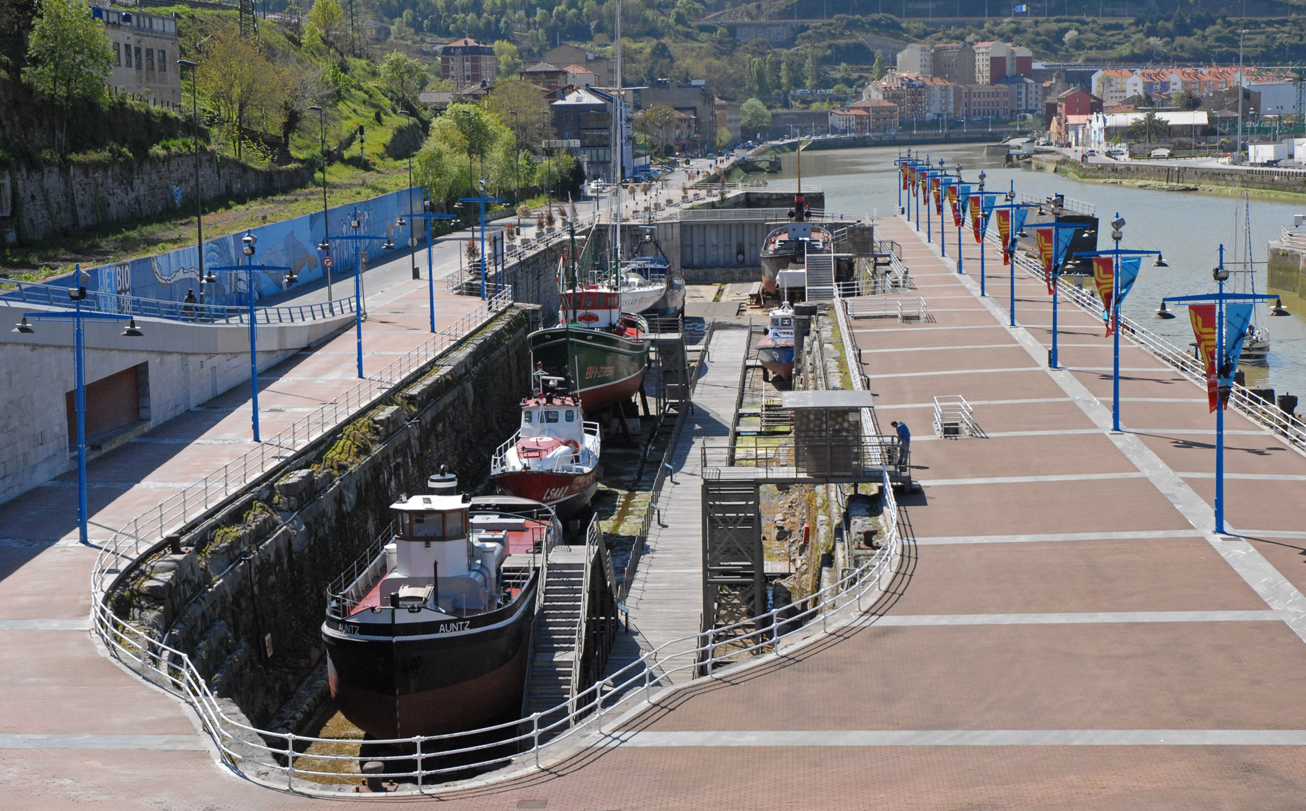 Le Musée maritime Le Musée maritime du Ria de Bilbao se trouve dans la zone des digues des anciens chantiers navals Euskalduna, à Abandoibarra, symbole d'un Bilbao nouveau, défini par les loisirs, les affaires, la culture et une Ria qui redevient l'axe structurant de l'aire métropolitaine.